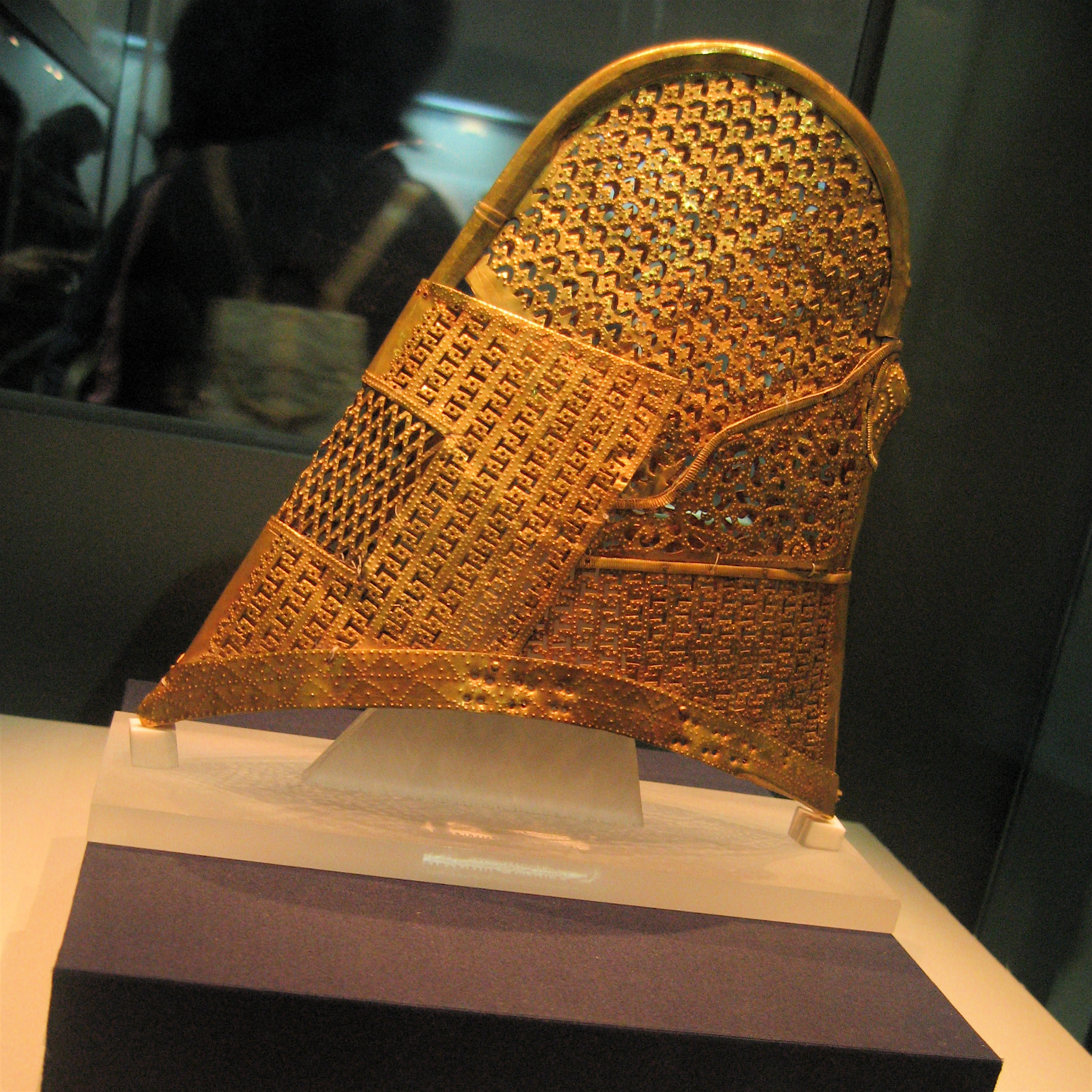 Korea-Silla Kingdom-Golden hat